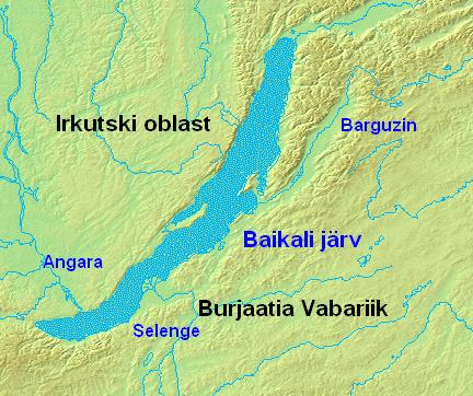 Baikali järve kaart